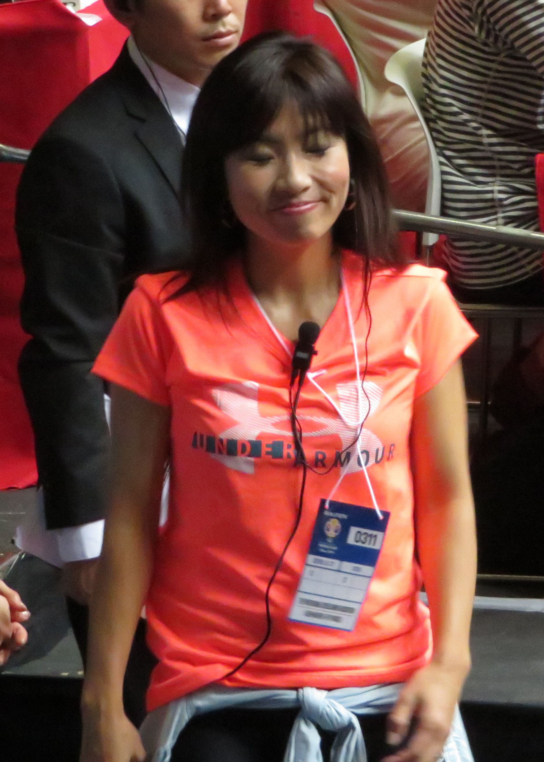 「FIBAバスケットボールワールドカップ2019 アジア地区 2次予選（Window4）」2018年9月18日 日本代表 対 イラン代表 （大田区総合体育館）